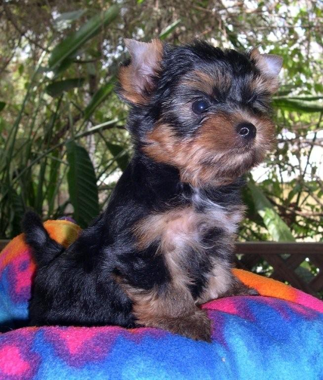 Štěně 8 týdnů